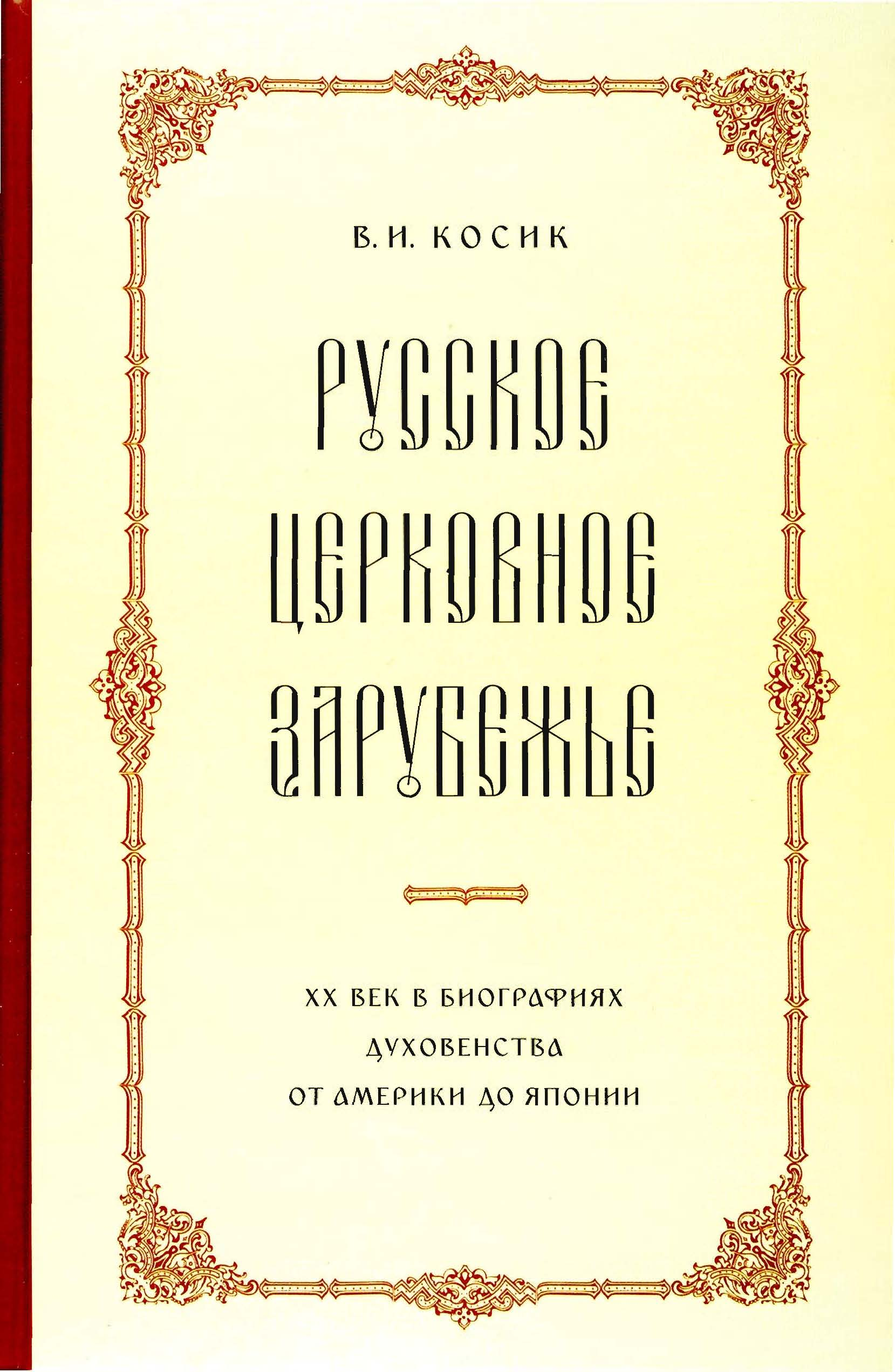 Церковное зарубежье